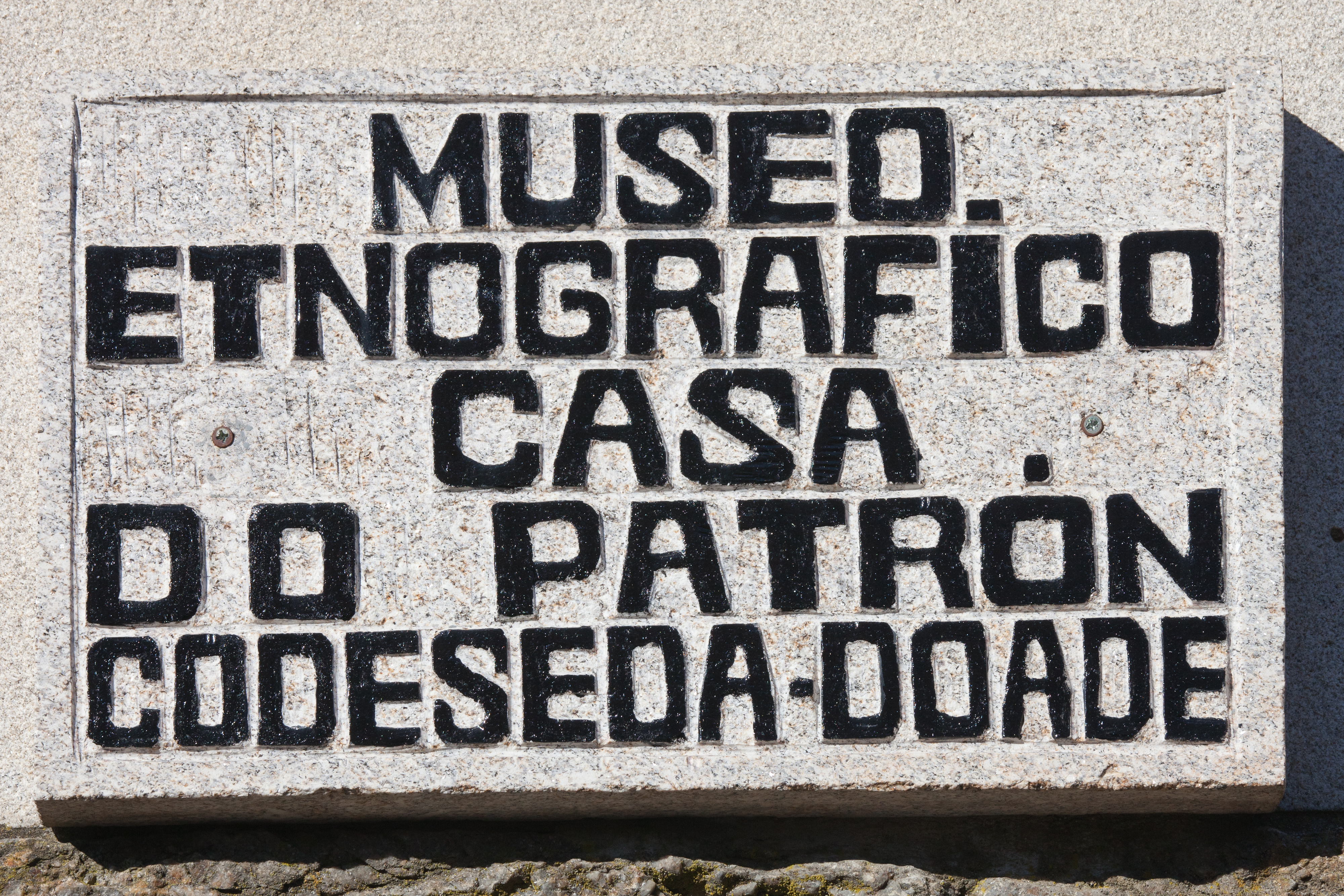 Casa do patrón, Doade, Lalín